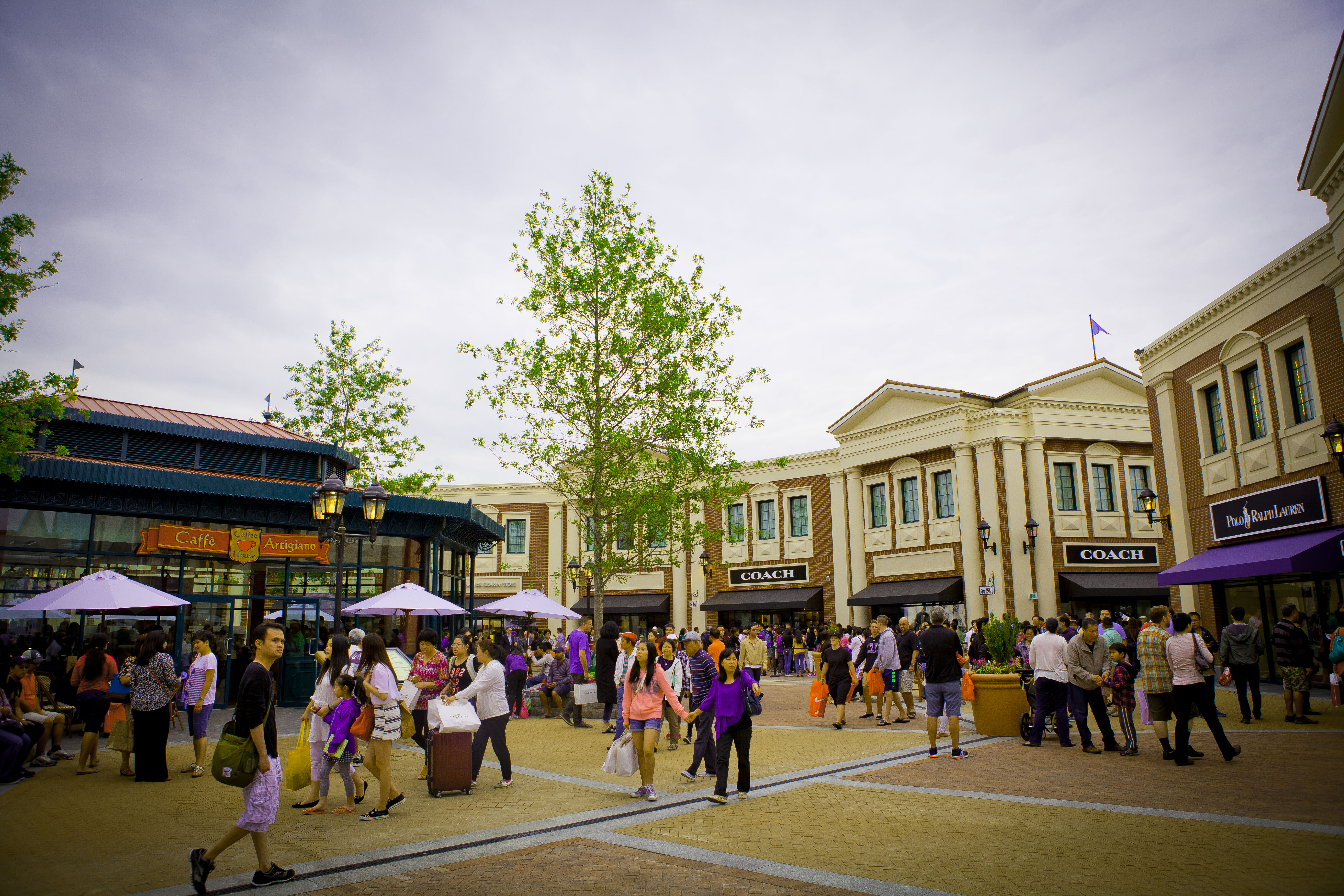 McArthurGlen Designer Outlet Vancouver Airport